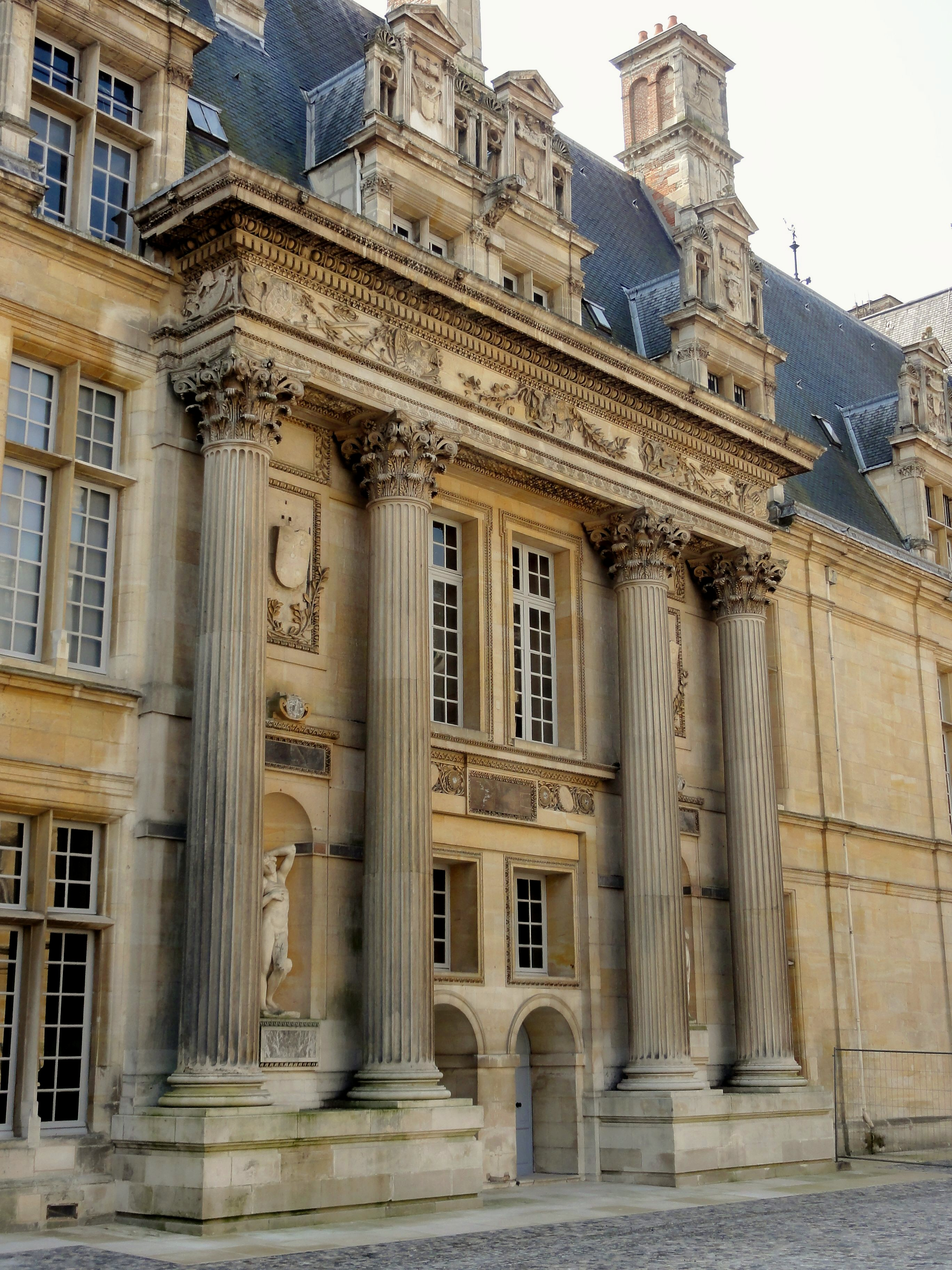 Aile méridionale, péristyle côté nord, sur la cour.